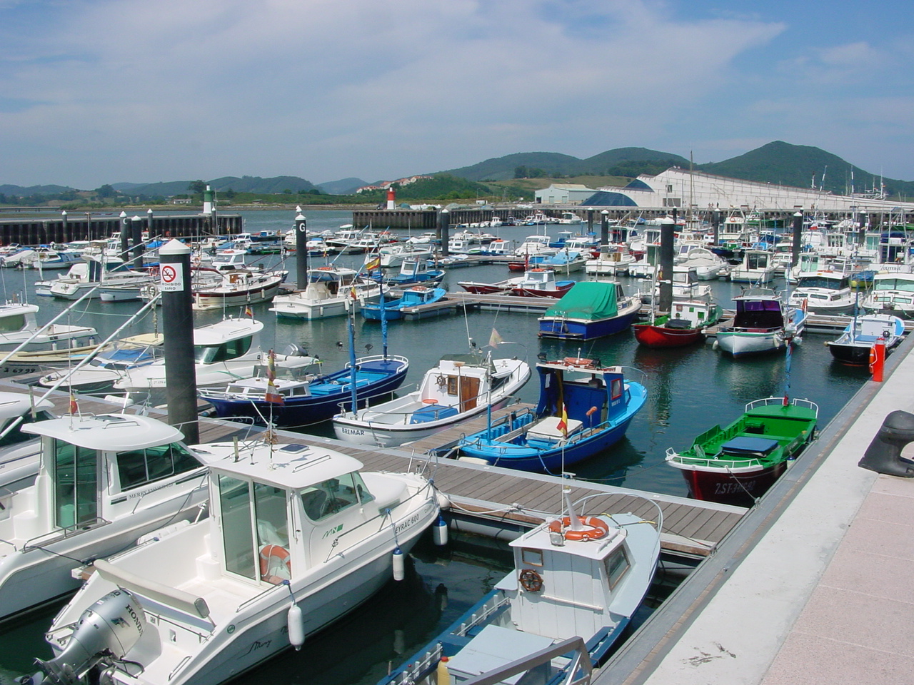 Puerto deportivo de Santoña Cantabria, España).